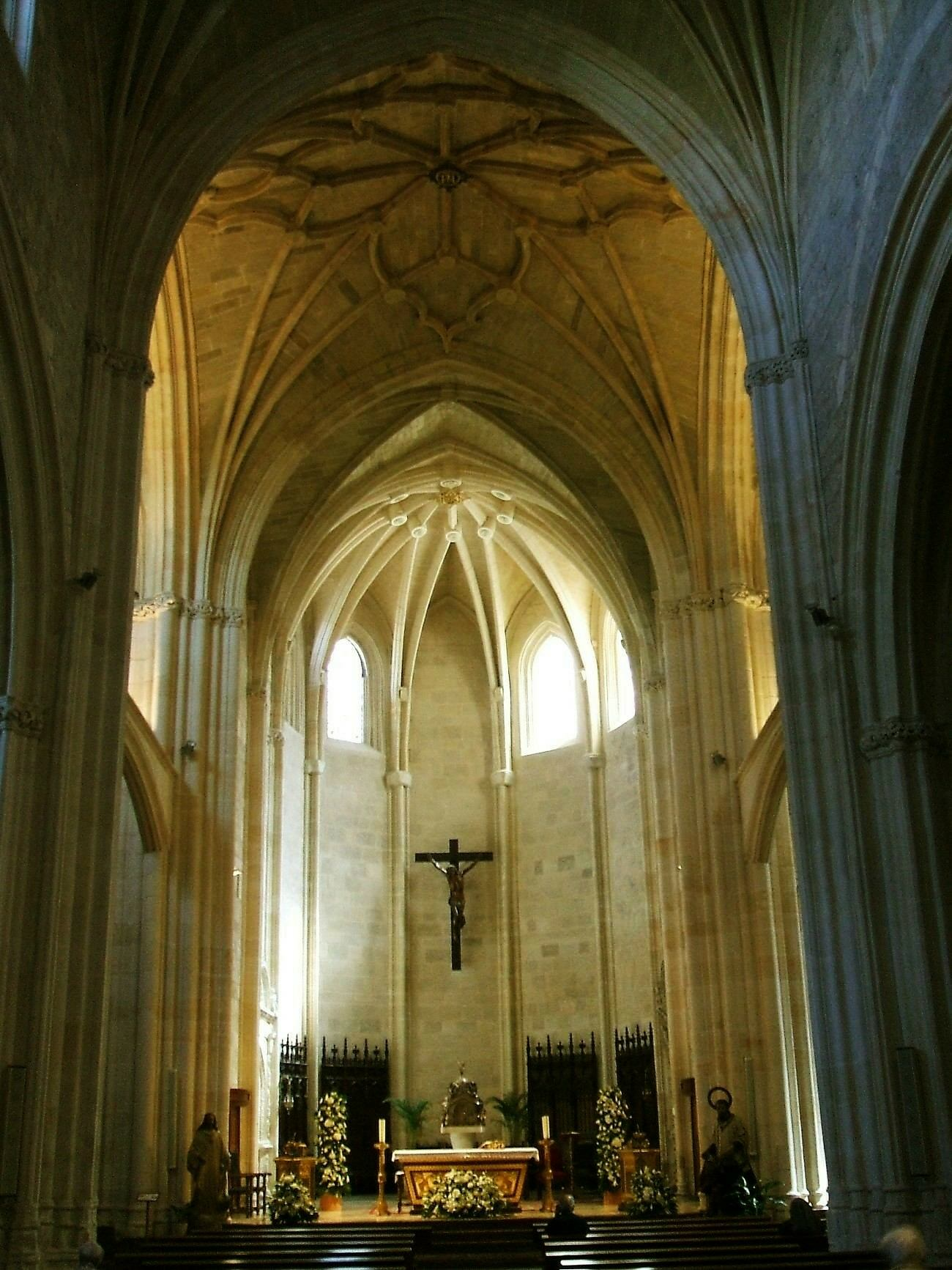 Iglesia de La Merced, Burgos